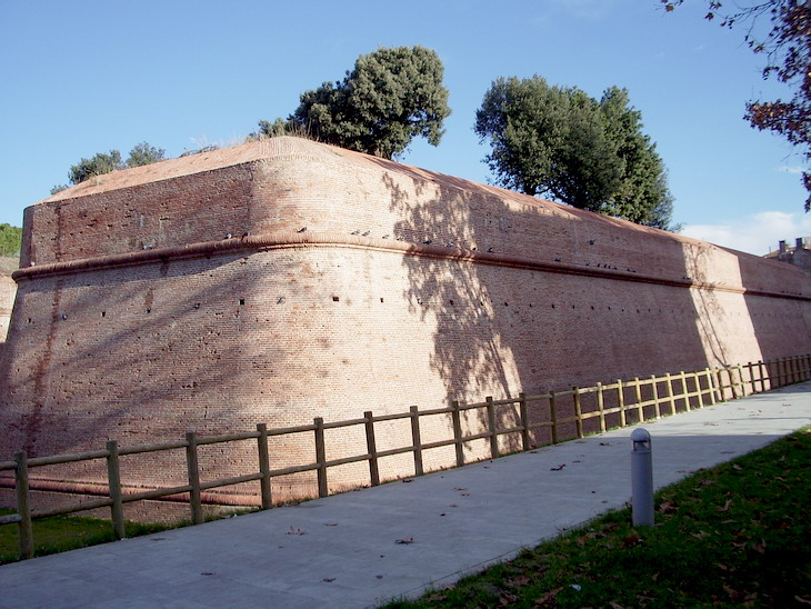 Bastione Maiano Grosseto